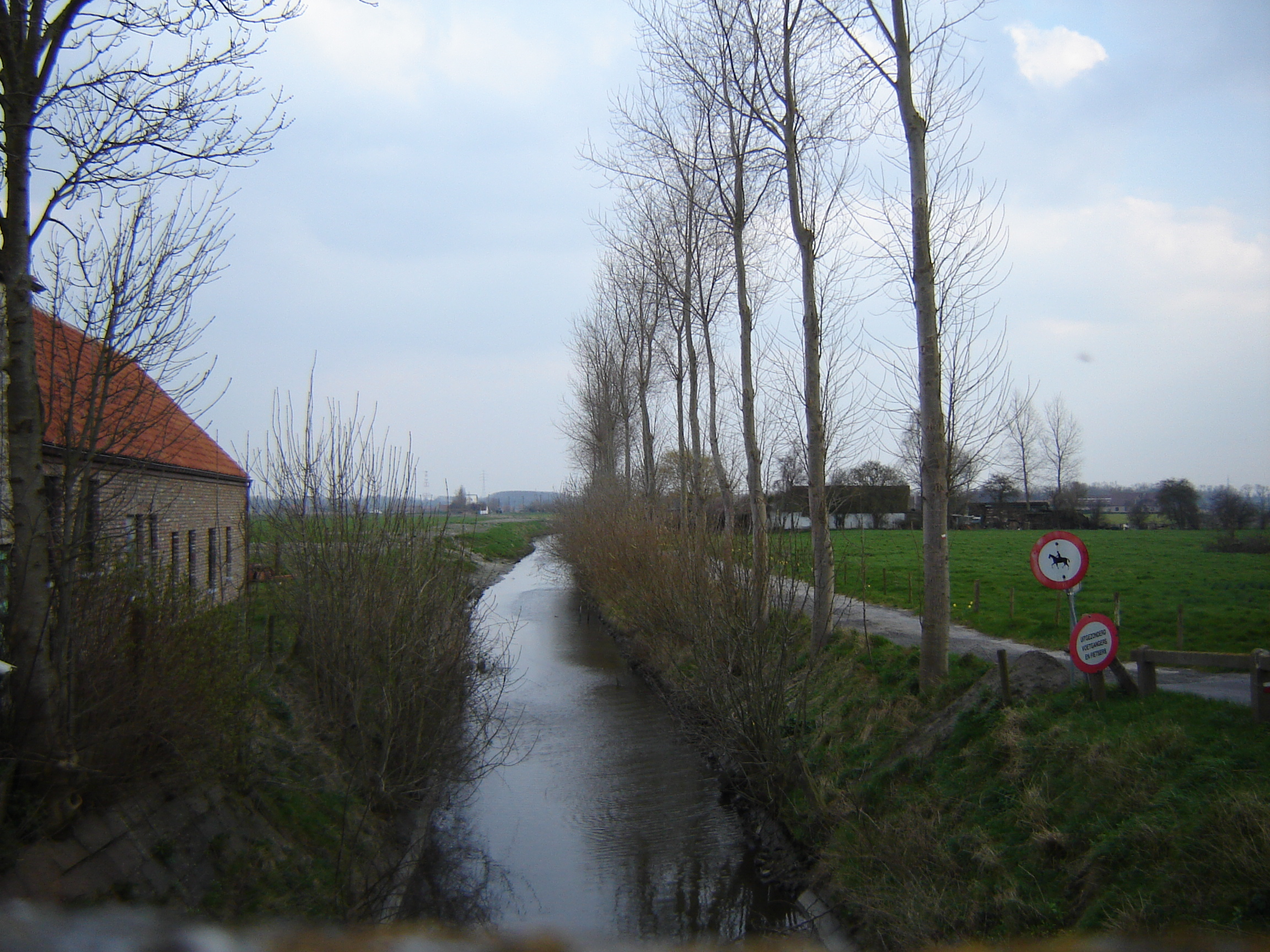 Blankenbergs Vaartje in Meetkerke, zuidelijke richting Blankenbergs Vaartje in Meetkerke, southern direction. Meetkerke, in Zuienkerke, West Flanders, Belgium